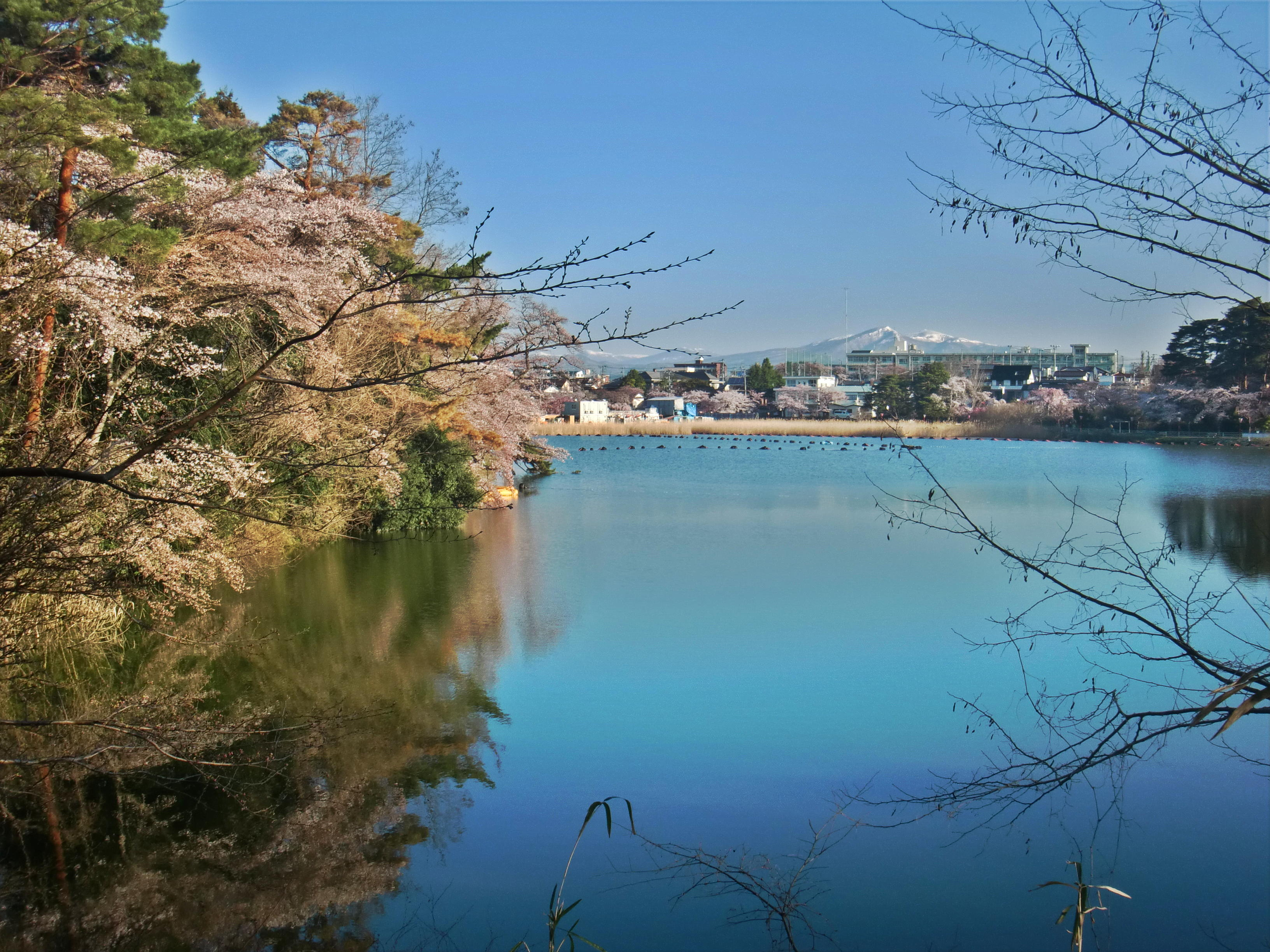 郡山市 五百渕 桜の季節 東側からの眺め